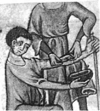 Pratique d'une saignée